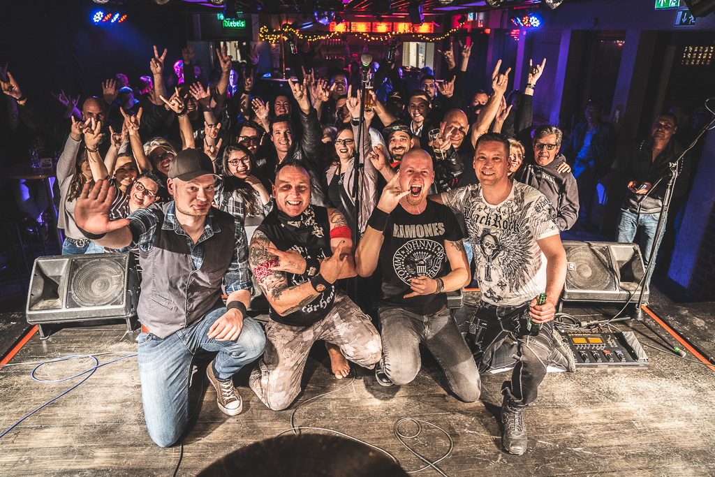 BOOL beim Rock im Parkhaus 2.0 im Parkhaus Meiderich, Marc Fröhlking, Jens Geilert, Karsten Dittberner, Uwe Fischer